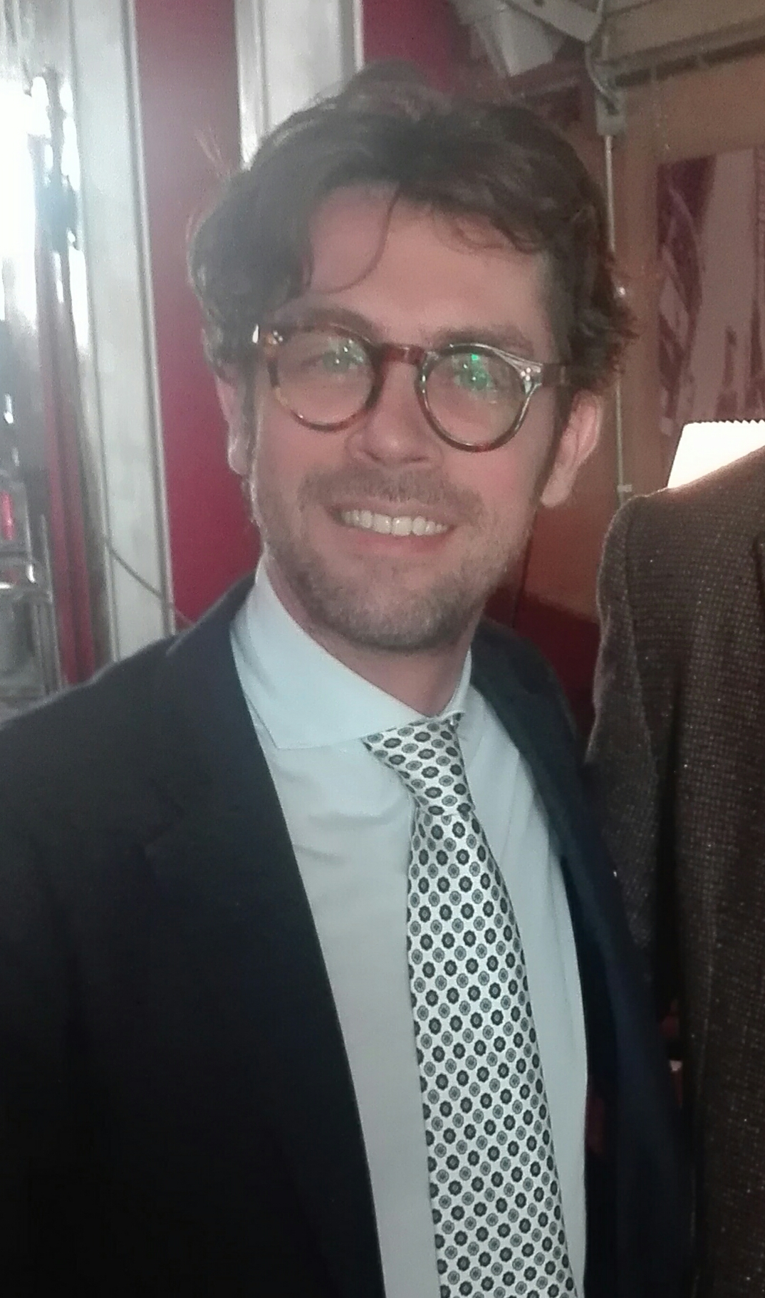 Il personaggio televisivo italiano Raffaello Tonon nel 2018